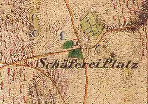 Platz, 1890 wüst gewordenes Vorwerk auf der Gemarkung Haselberg, Ortsteil der Stadt Wriezen, Landkreis Märkisch-Oderland, Brandenburg, Deutschland, Ausschnitt aus dem Urmesstischblatt 3249 Heckelberg von 1844